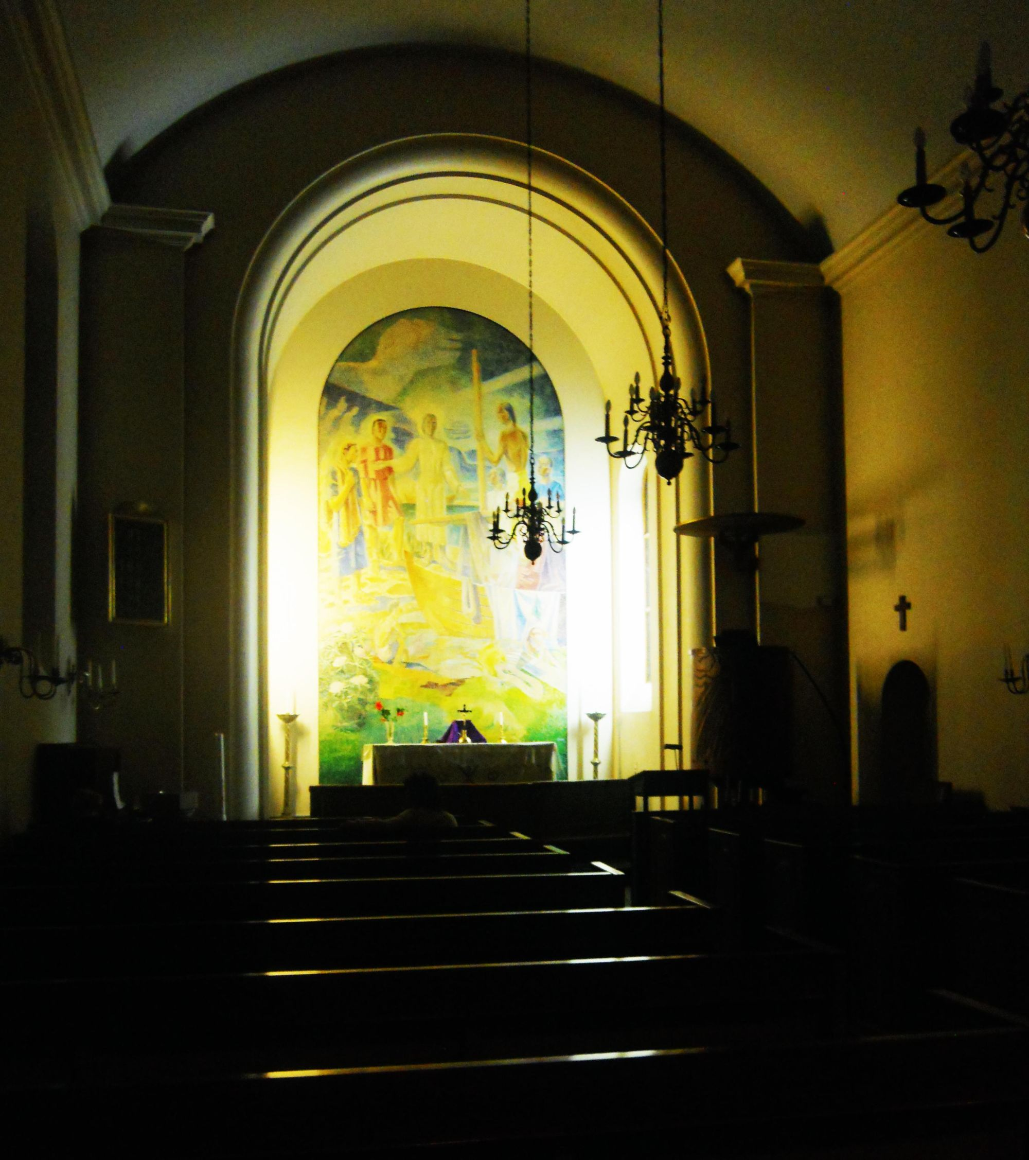 Svenska Kyrkan i Buenos Aires